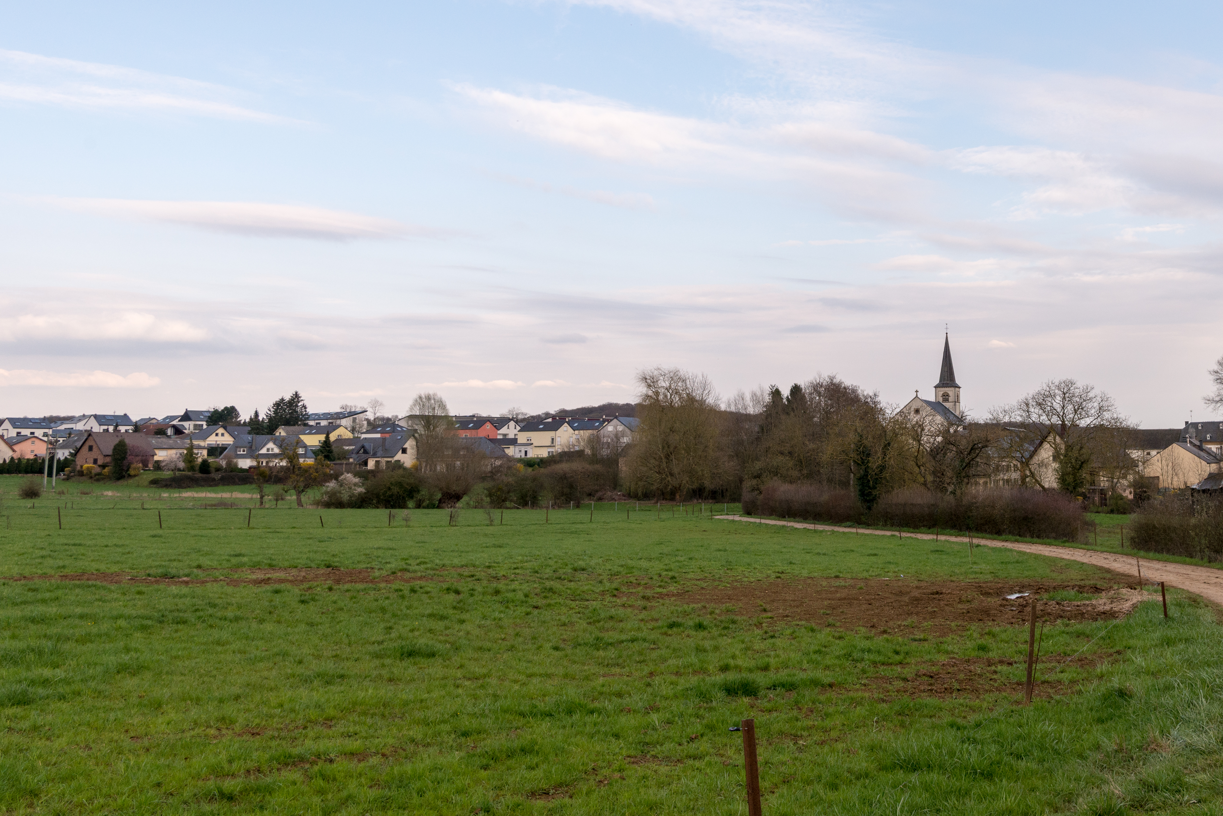 Vue op Weiler-zum-Tuerm.